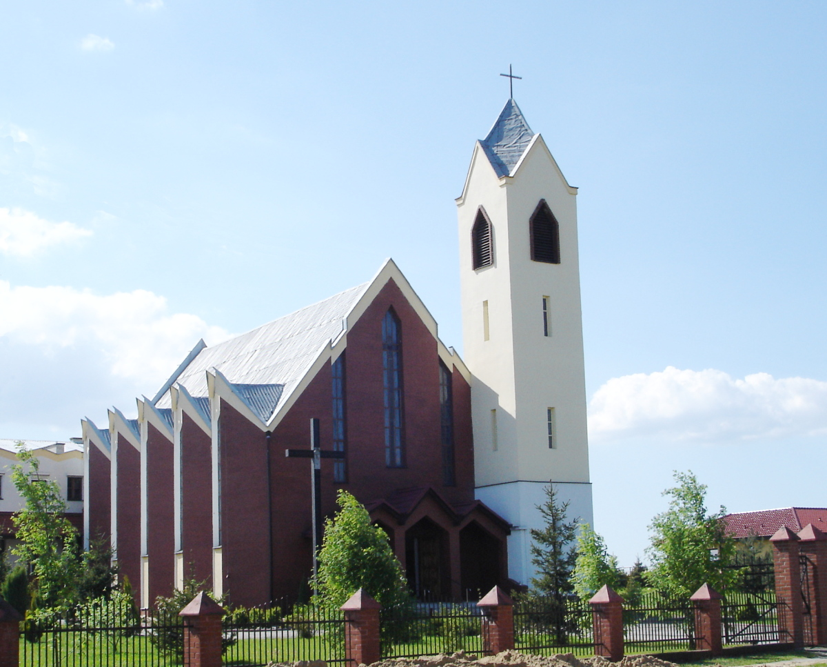 Witkowo Pierwsze - rzymskokatolicki kościół p.w. Zwiastowania Pńńskiego Church in Witkowo I (Stargard County), Poland